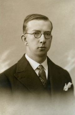 Philipp Aleksander Tammaru, eesti vaimulik